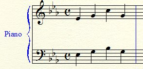 Voorbeeld van gebruik van accolade in de muzieknotatie